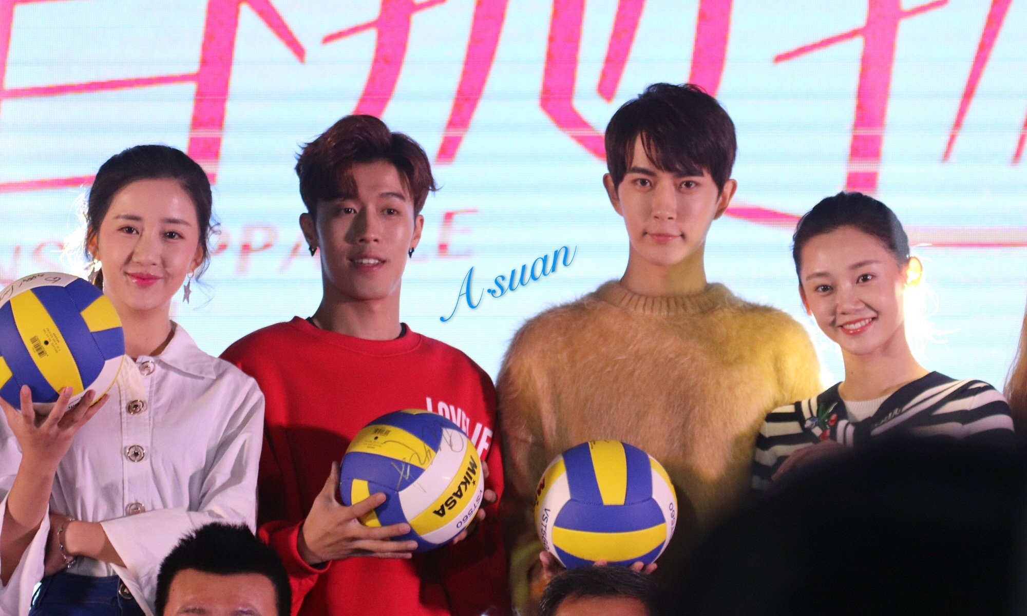 20171121 青春抛物线发布会